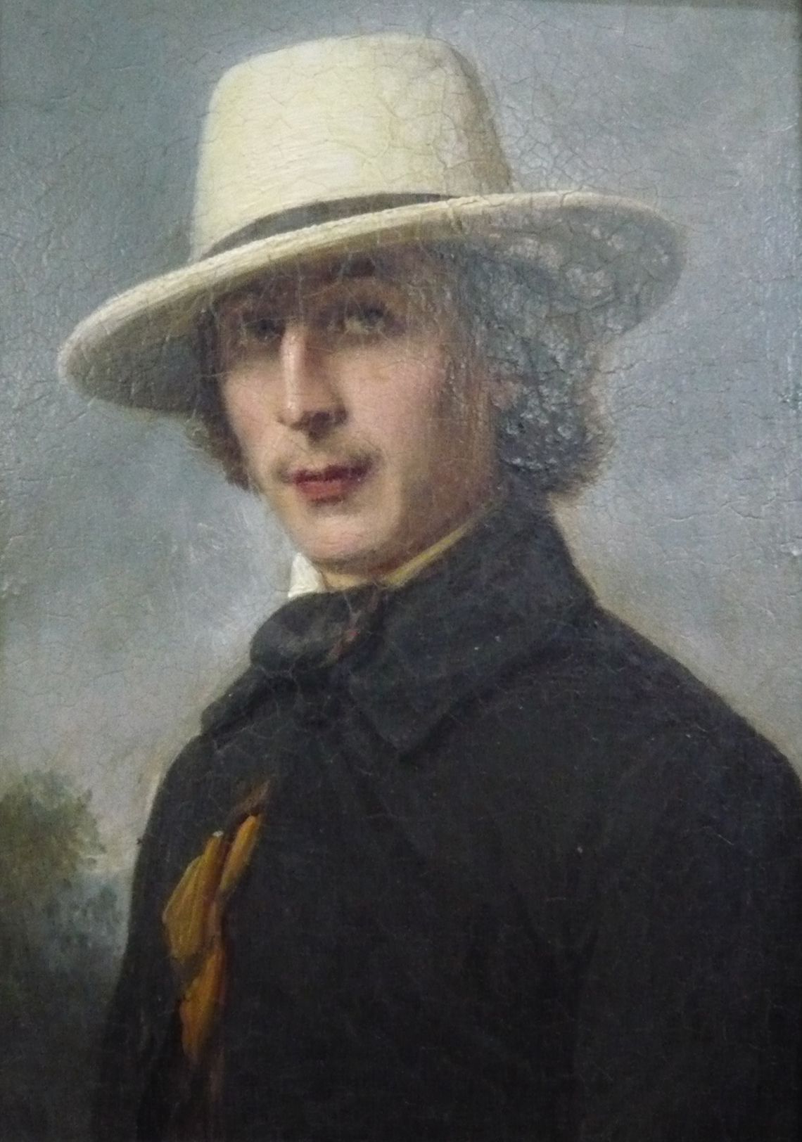 17 Michels - Porträt Alexander Michelis (1823–1868) - in Freundschaftsgalerie von Einzelbildnissen der Düsseldorfer Malerschüler und ihren Freunden (Vermächtnis des Künstlers)